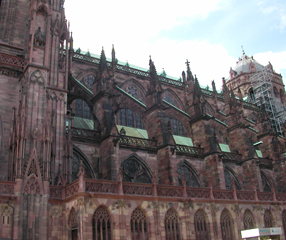 Arcs-boutants de la cathédrale de Strasbourg